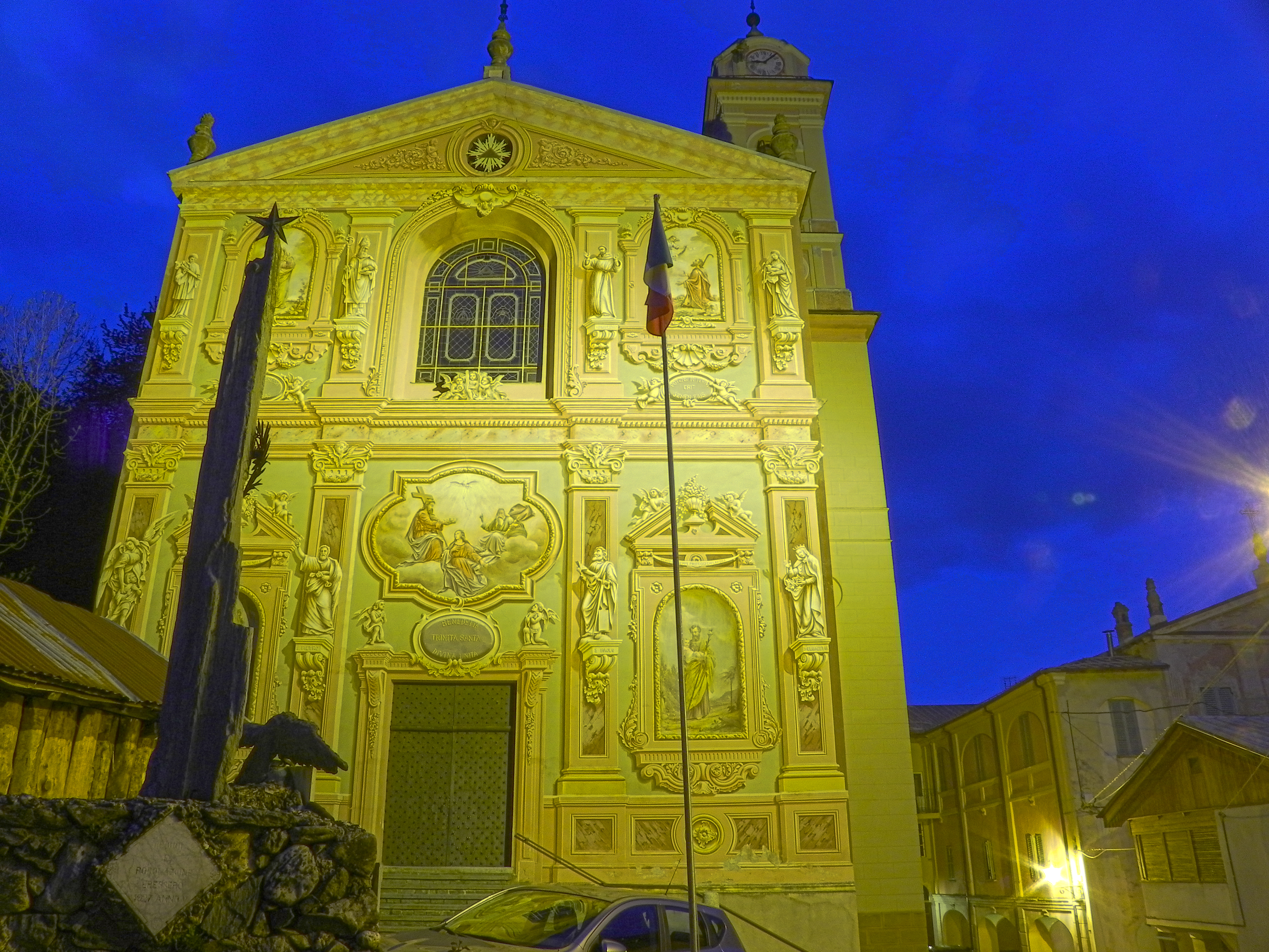 La facciata della Parrocchiale